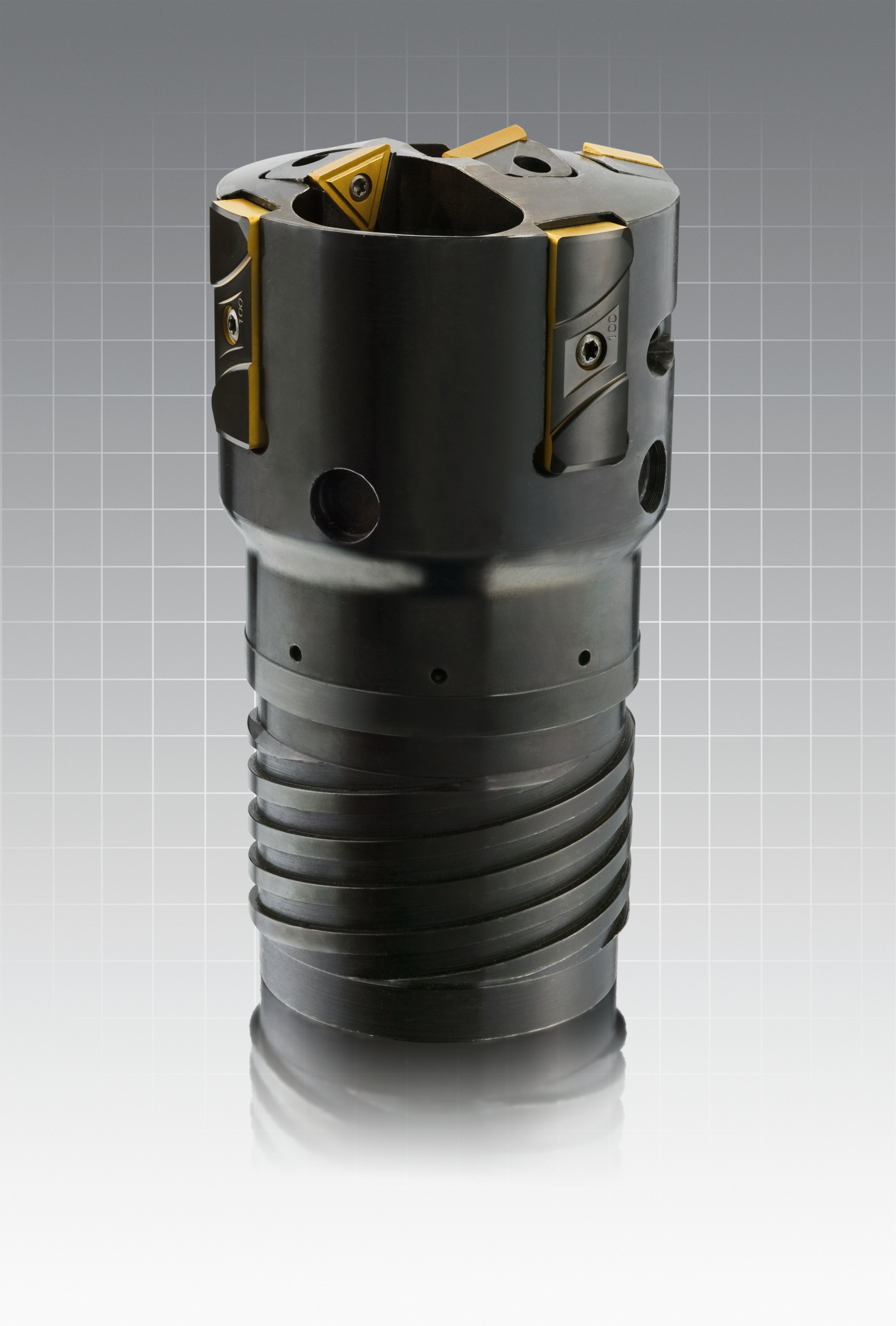 Bohrkopf zum Ejektortiefbohren der Firma Sandvik